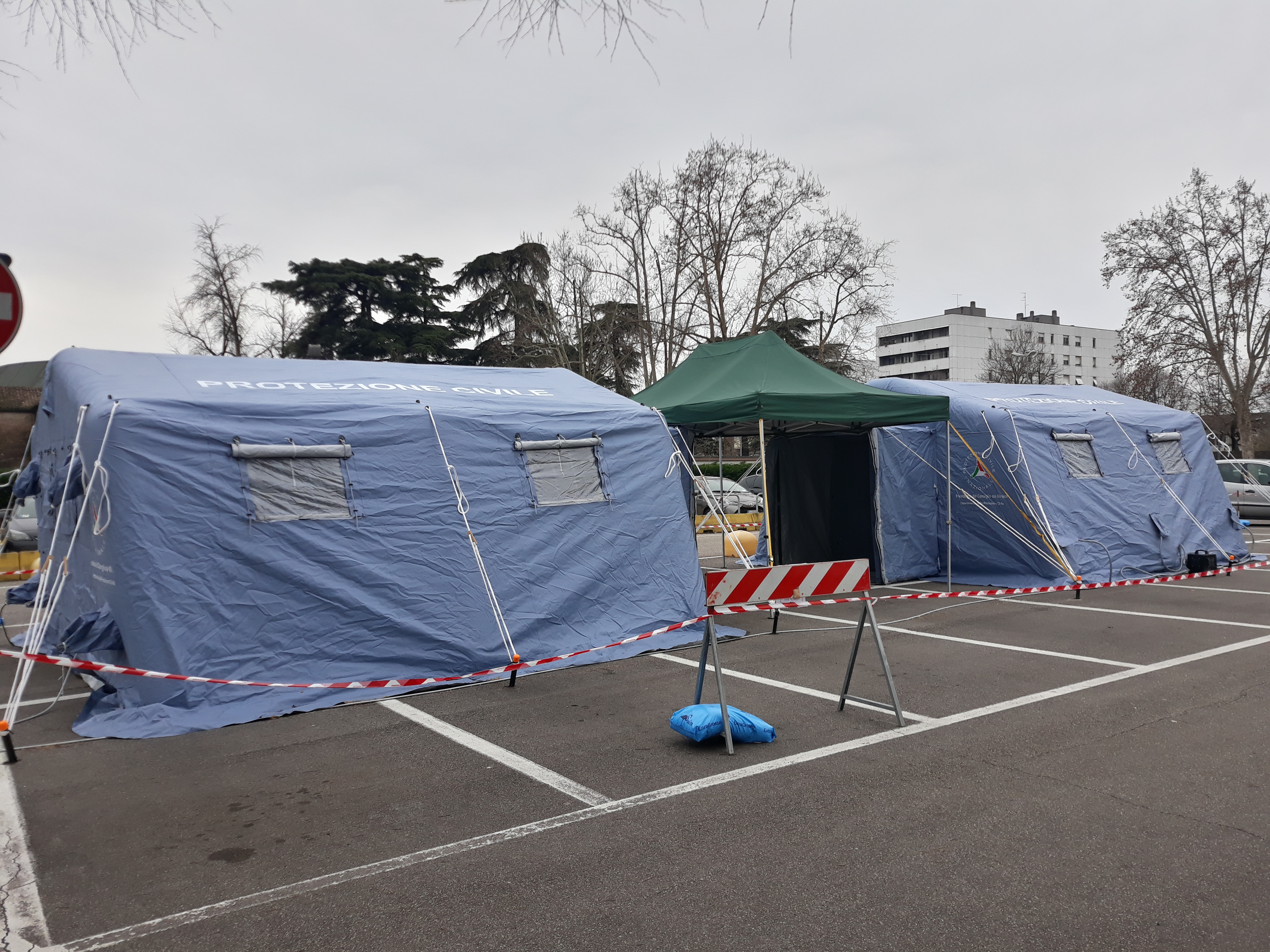 Tenda della protezione civile installata davanti al policlinico di Verona in occasione dell'epidemia di COVID-19